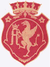 Escudo ciudad de Agnone (Isernia, Italy)